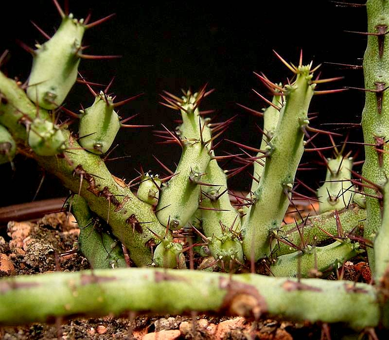 Euphorbia subscandens